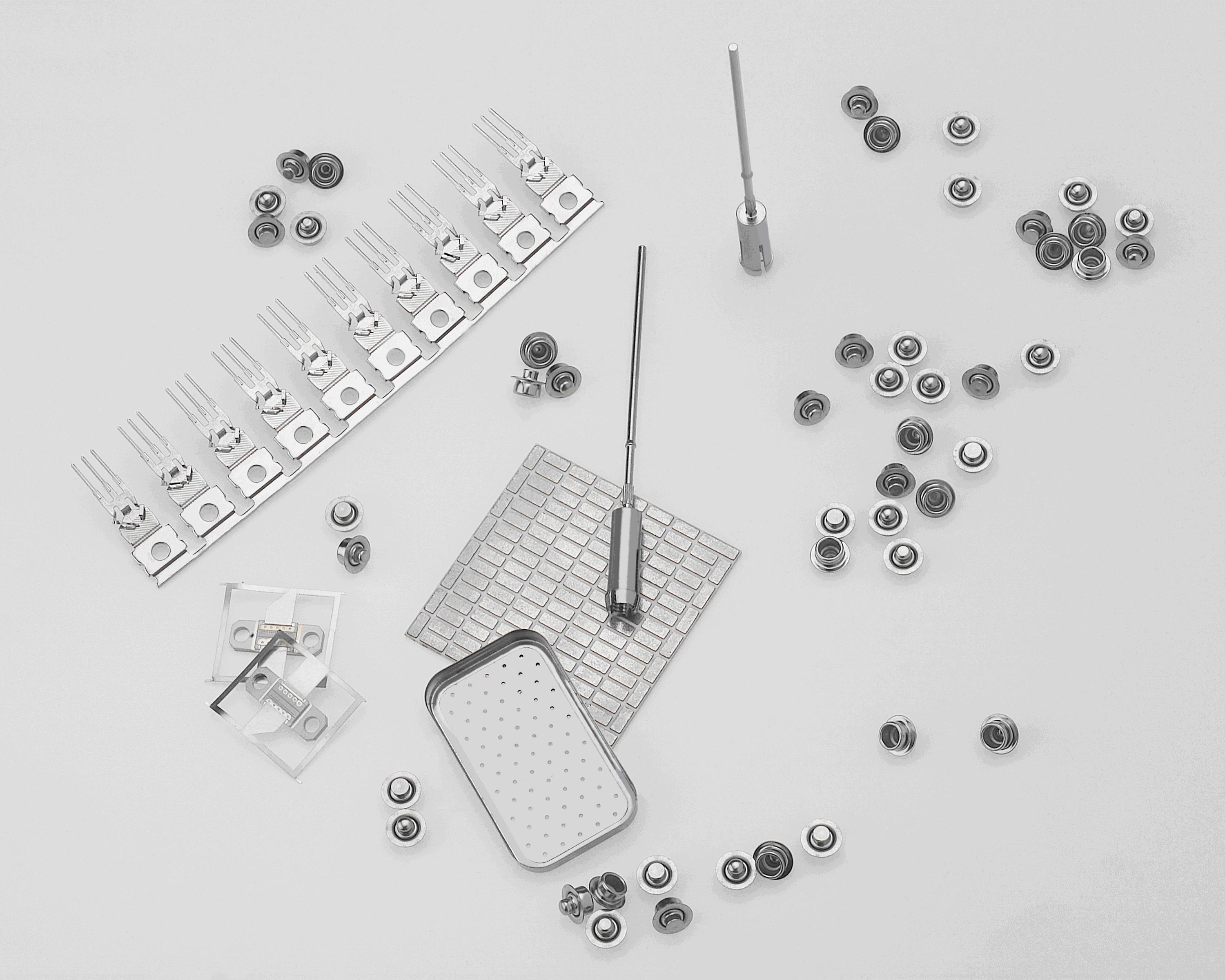 photos electroless nickel